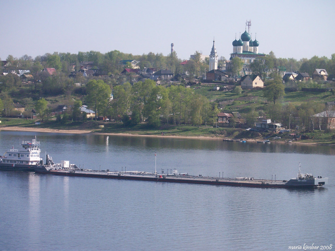 Вид на Воскресенский собор с Романовской стороны